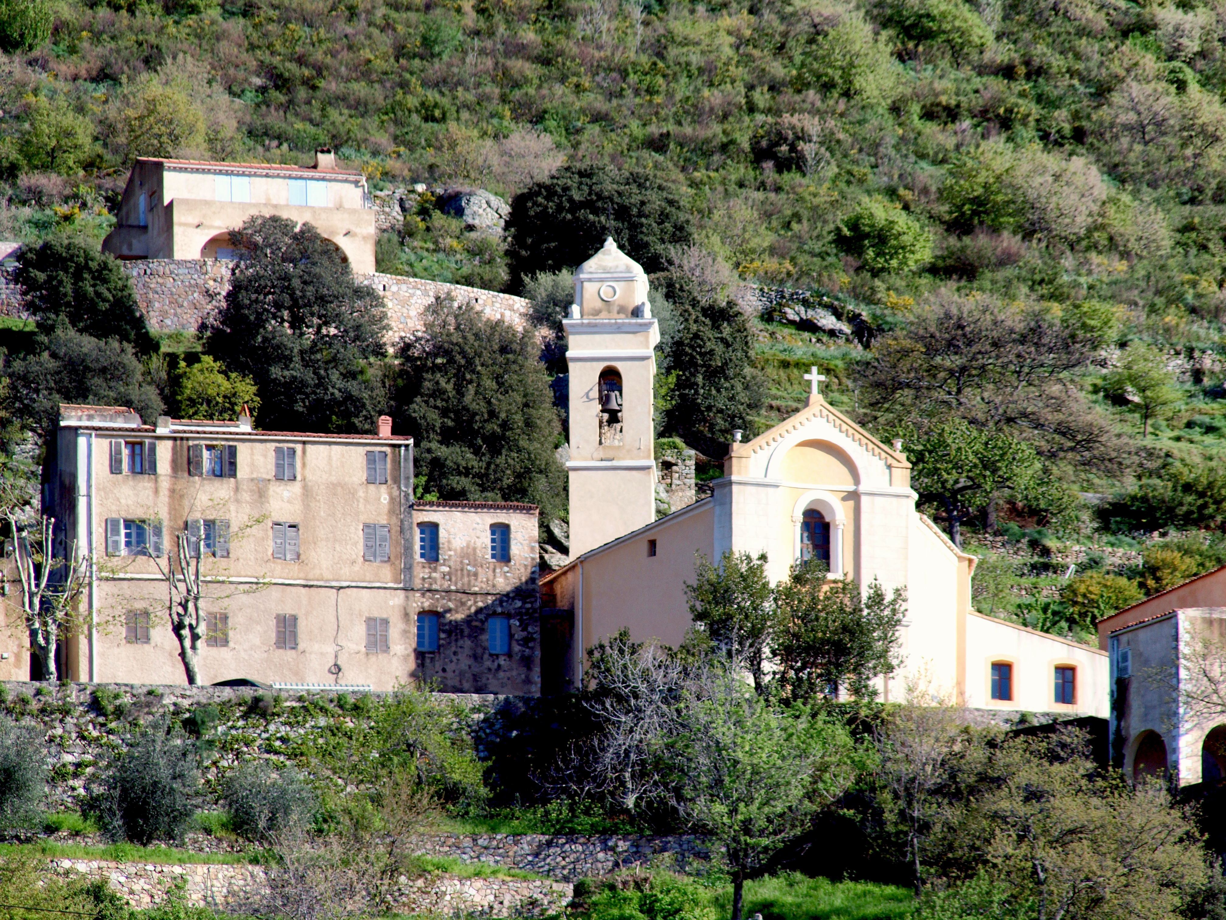 Nessa, Balagne (Corse) - L'église paroissiale Saint-Joseph située au cœur du village